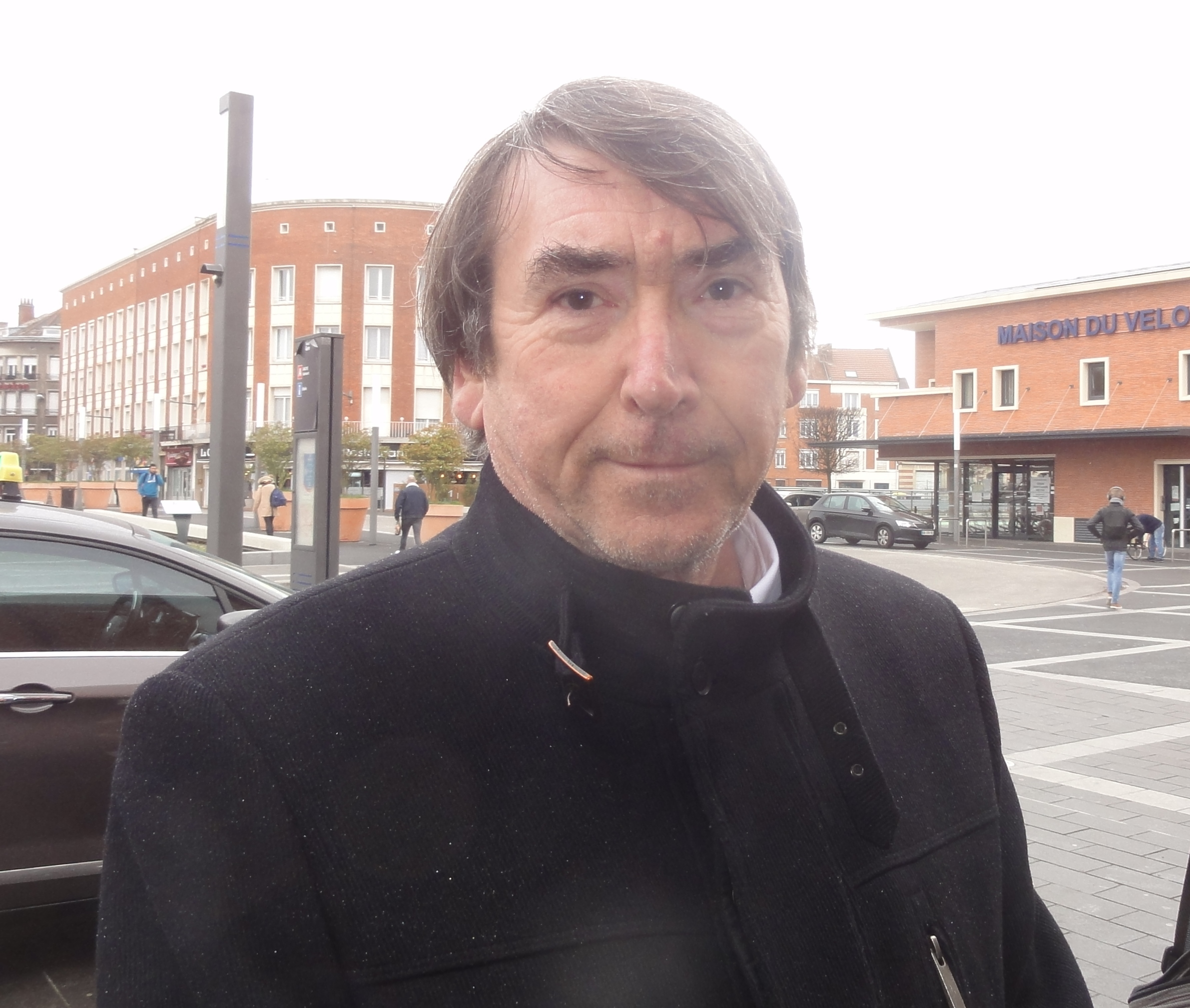 Manifestation contre la suppression des dessertes TGV en gare de Douai le 2 mars 2019. Depicted place: Douai railway station Depicted person: Charles Beauchamp – French politician